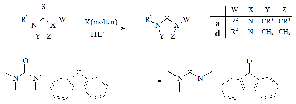 Dechalcogenation